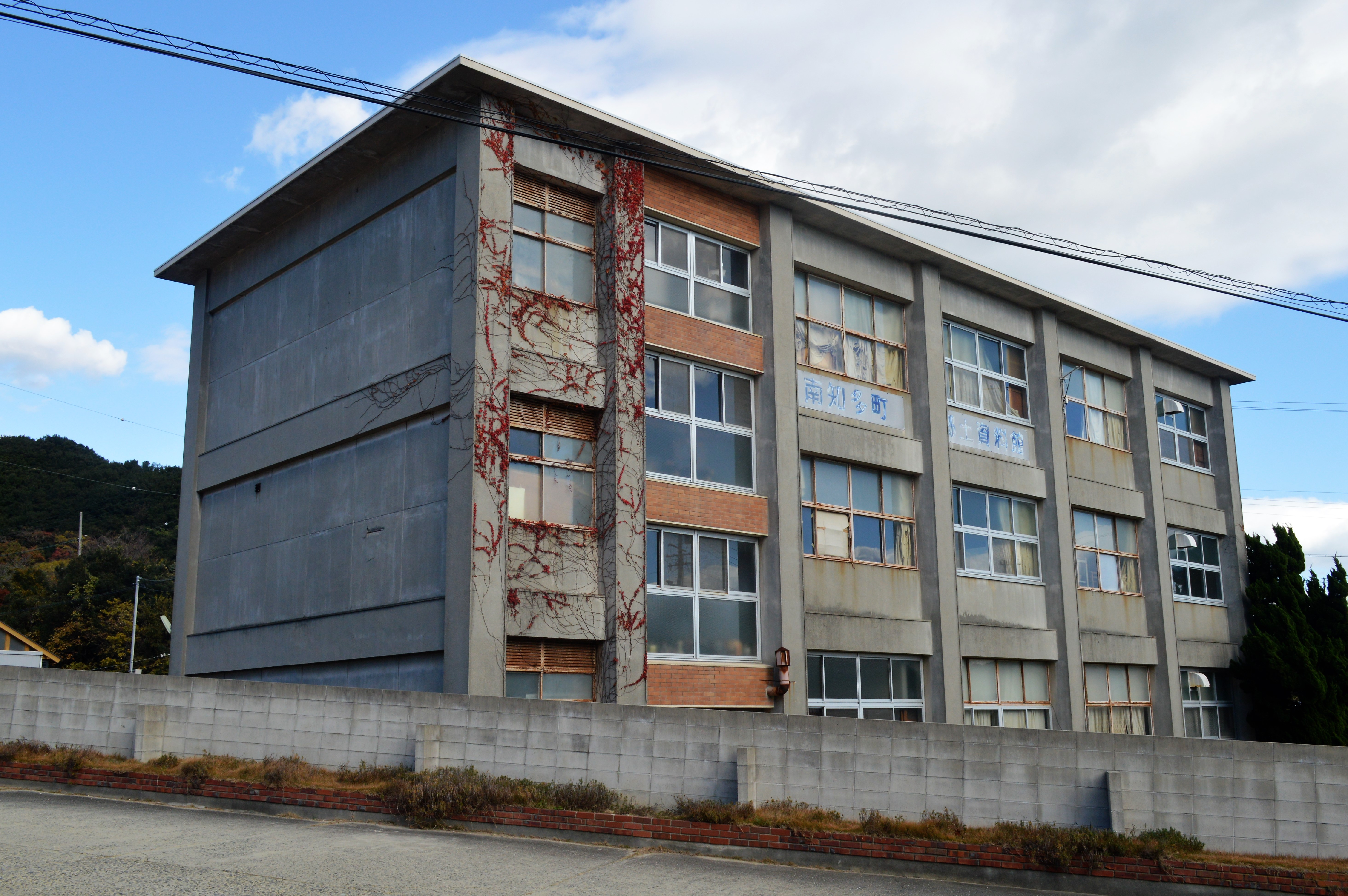 愛知県知多郡南知多町にある南知多町郷土資料館。